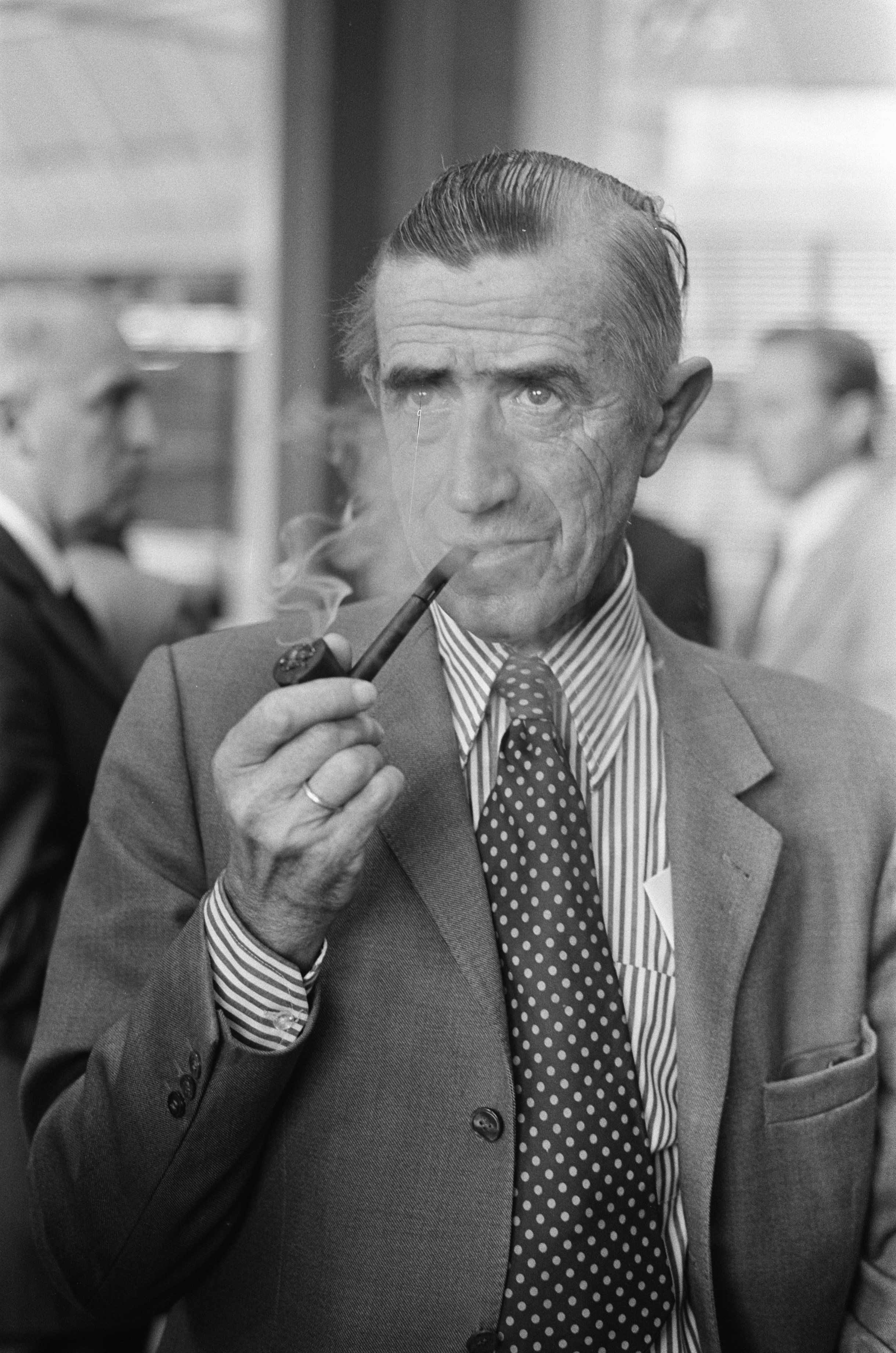 Collectie / Archief : Fotocollectie Anefo Reportage / Serie : [ onbekend ] Beschrijving : Minister T. Brouwer opent vakbeurs voor veredelingslandbouw Ornithophillia-Varuva, Minister Brouwer (kop) Datum : 3 oktober 1973 Trefwoorden : beurzen, ministers, openingen Persoonsnaam : Brouwer, T. Instellingsnaam : Ornithophillia-Varuva Fotograaf : Punt, […] / Anefo Auteursrechthebbende : Nationaal Archief Materiaalsoort : Negatief (zwart/wit) Nummer archiefinventaris : bekijk toegang 2.24.01.05 Bestanddeelnummer : 926-7246